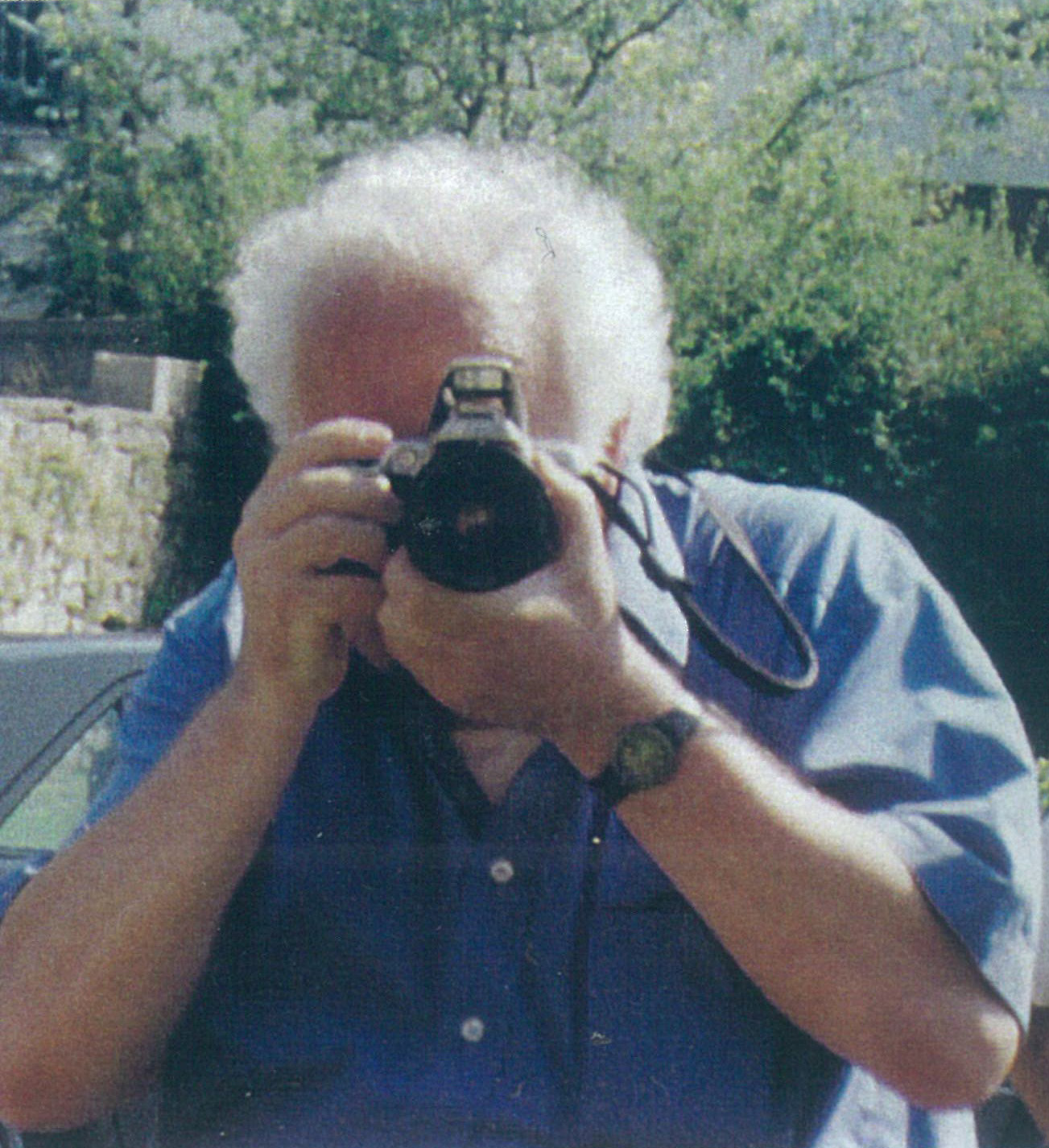 den Fotokünstler Walter Benigni beim 2. Europa-Symposium Kaisersteinbruch